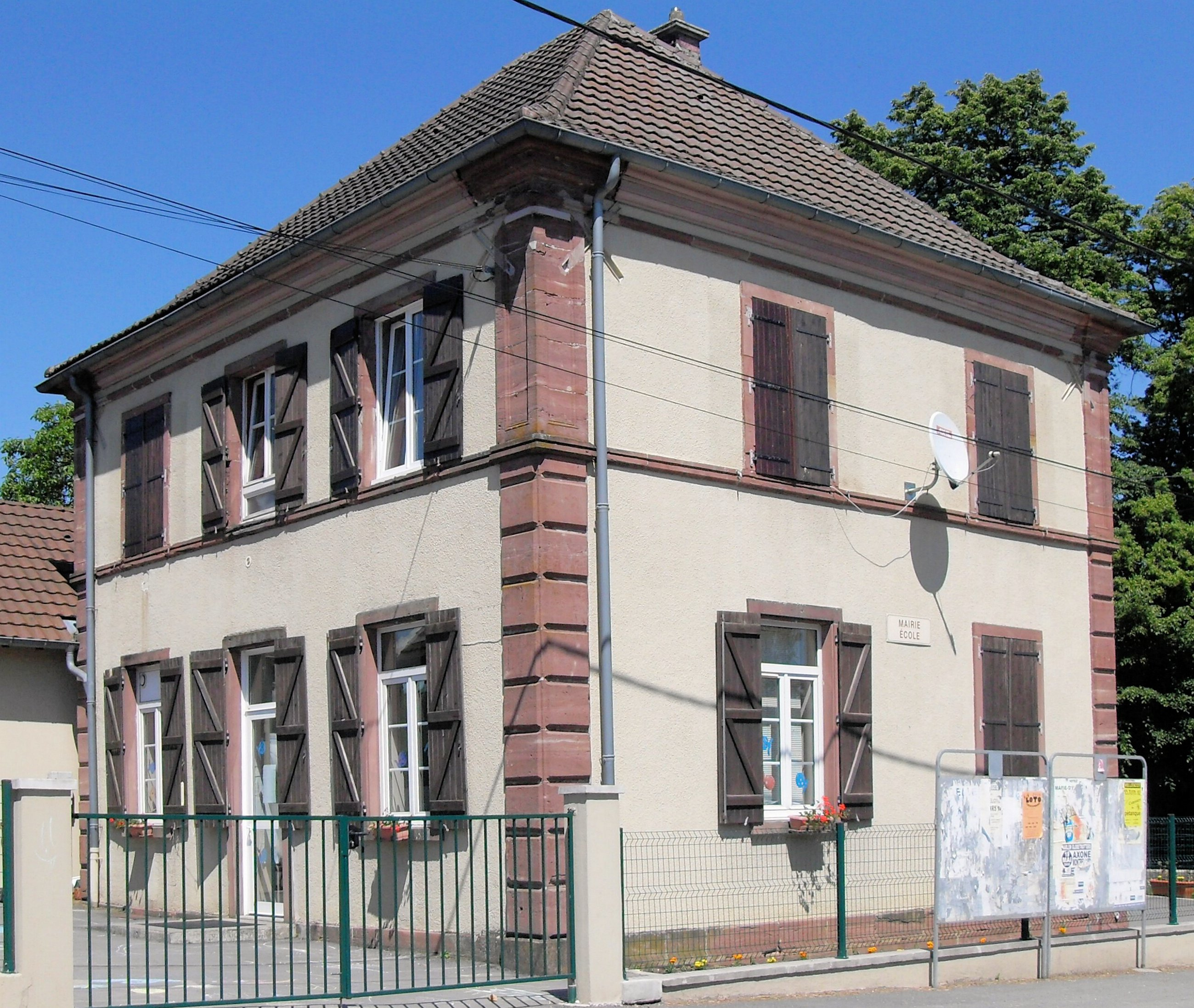 La mairie-école de Vellescot